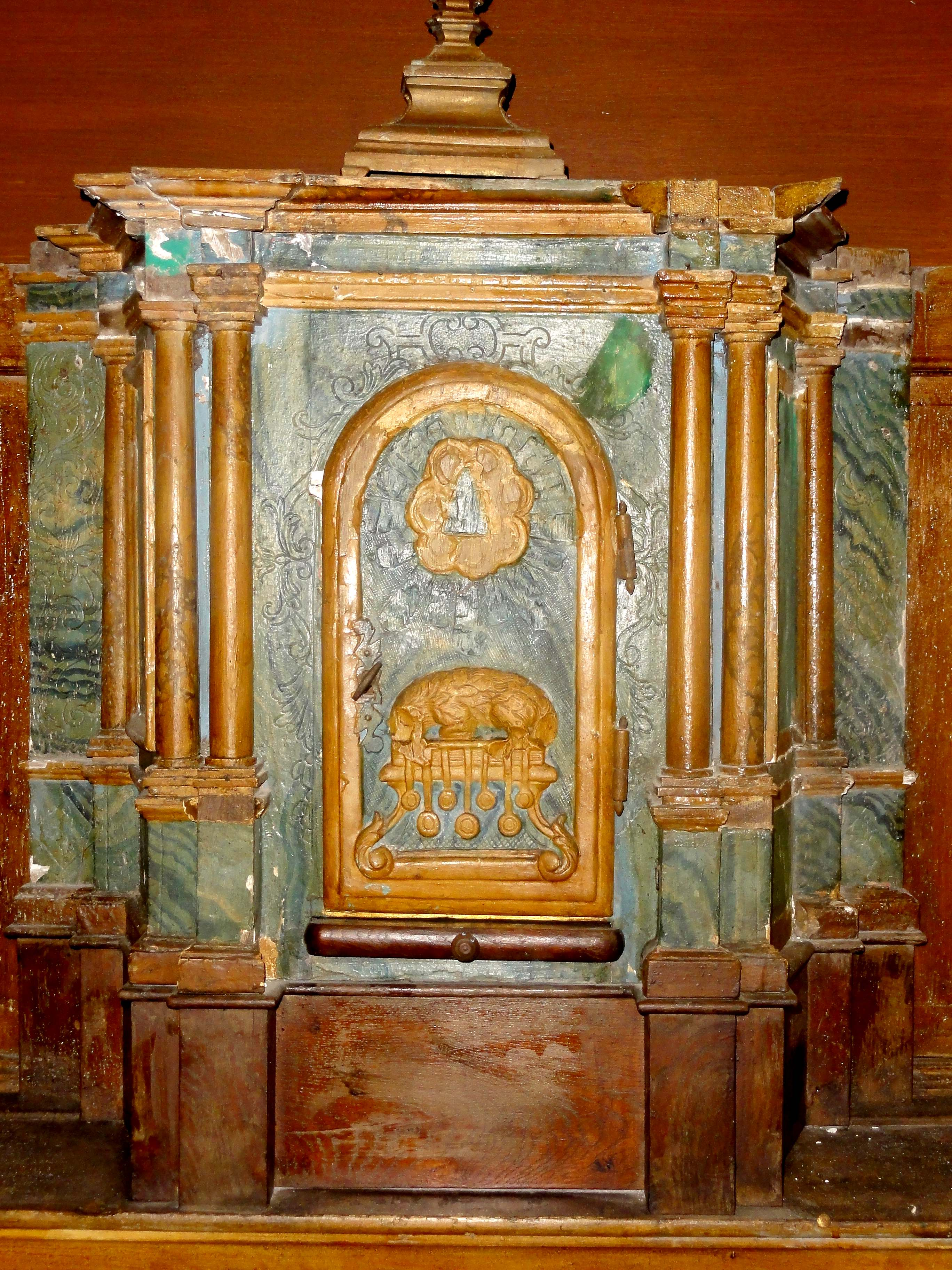 Tabernacle.